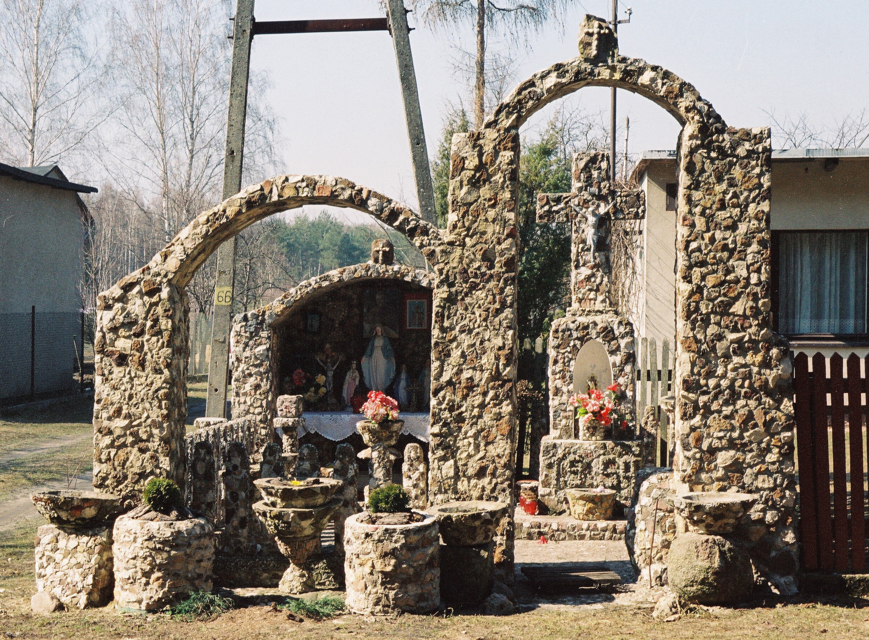 kapliczka miejscowości Niwy (gmina Woźniki, powiat lubliniecki, woj. śląskie)